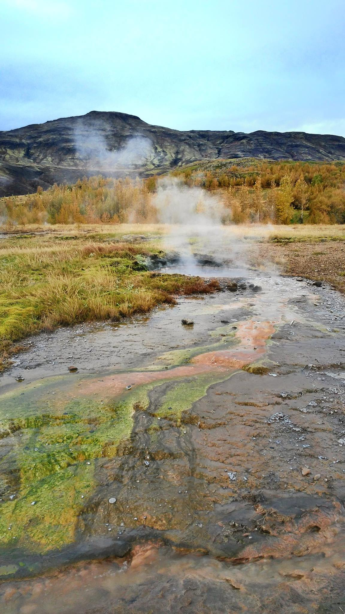 Gejzir na Islandu